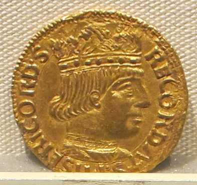 Palazzo Massimo alle Terme